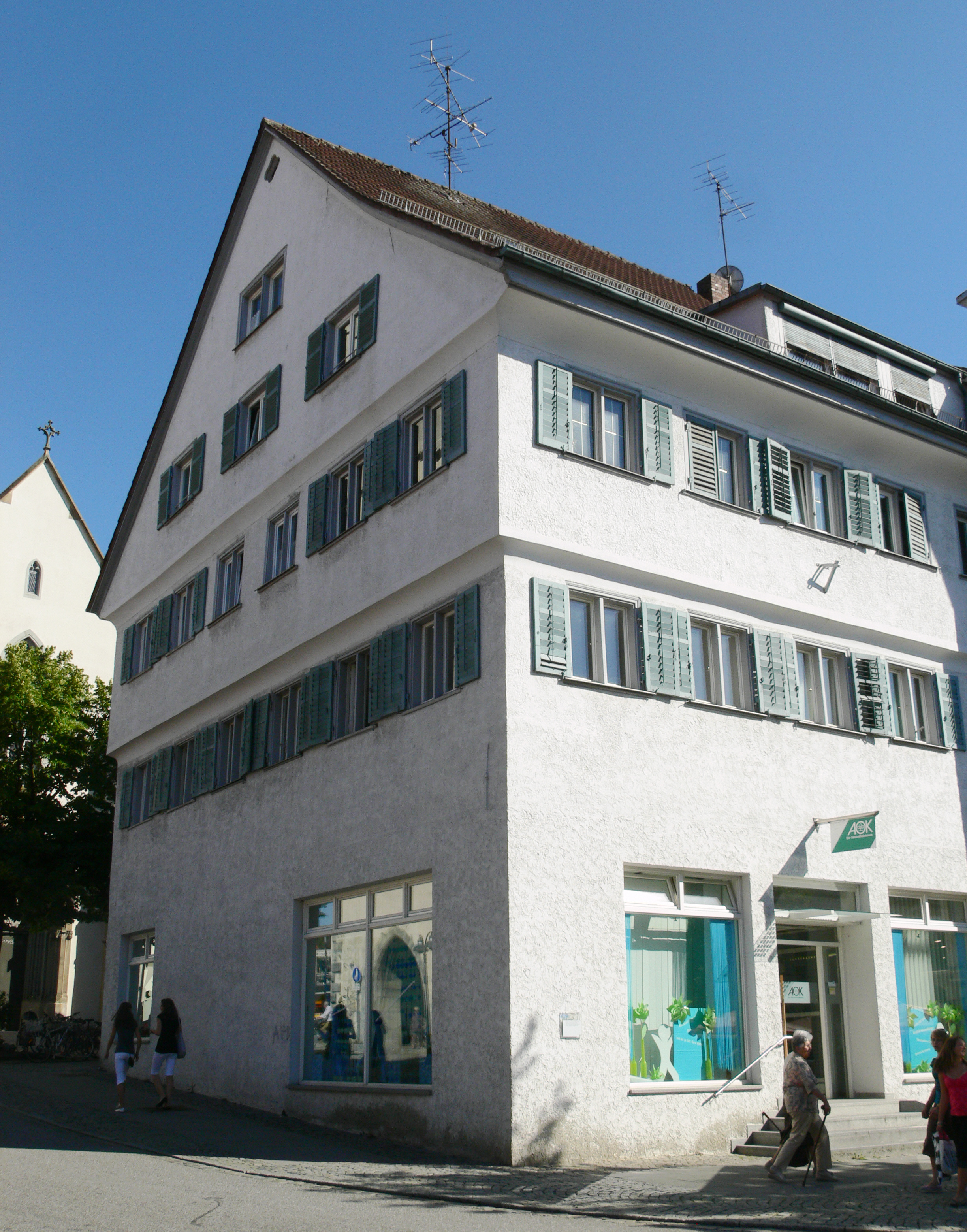 Ravensburg, Marienplatz, ehemalige Lateinschule (1351–1802), ab 1878 katholische Mädchenschule